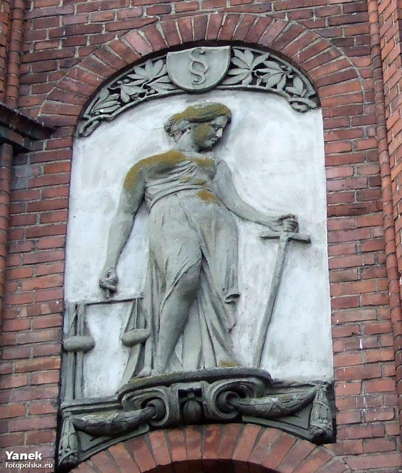 Motywy na budynku.